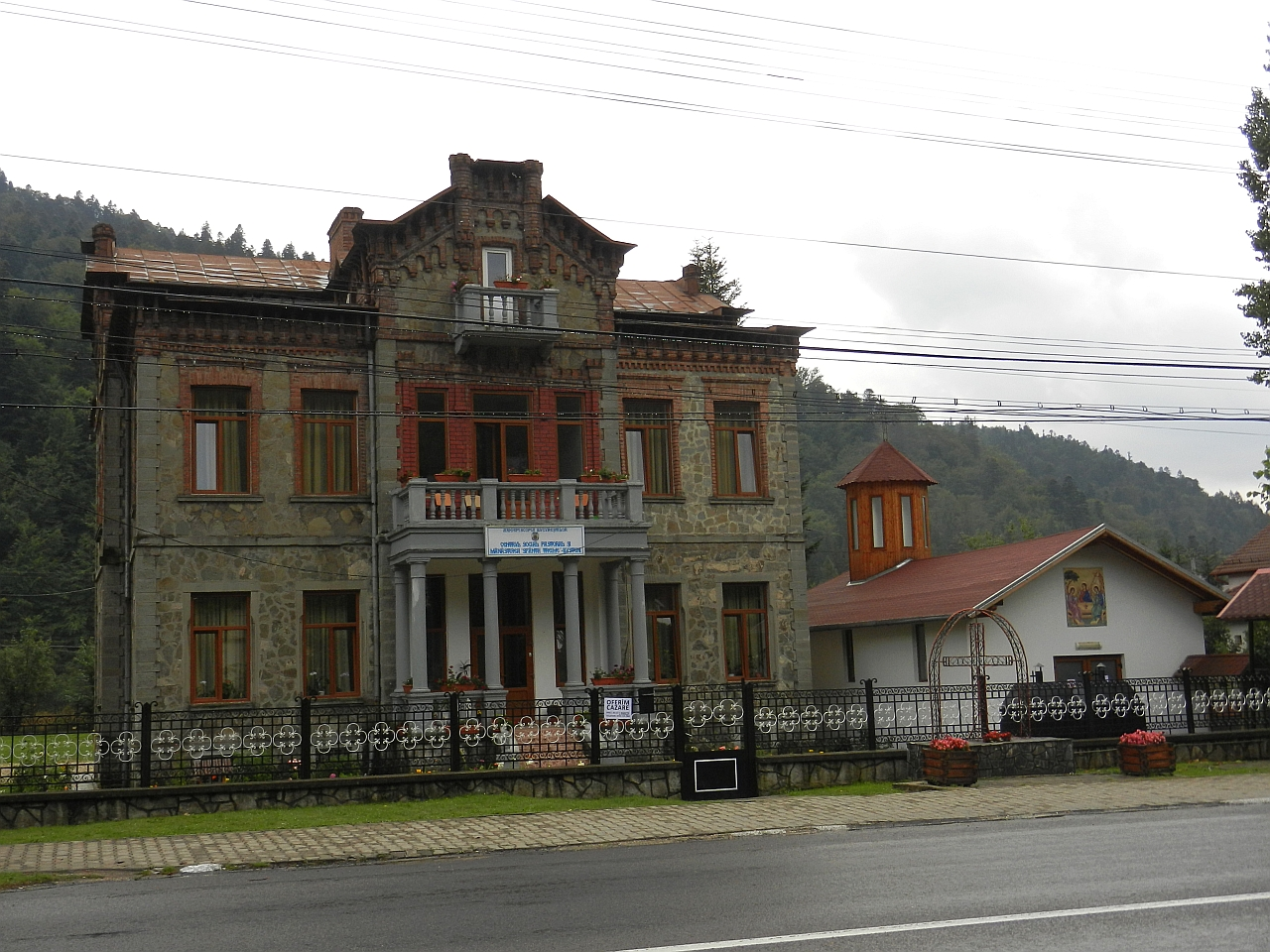 Casa, azi Casa de Odihnă a Preoților